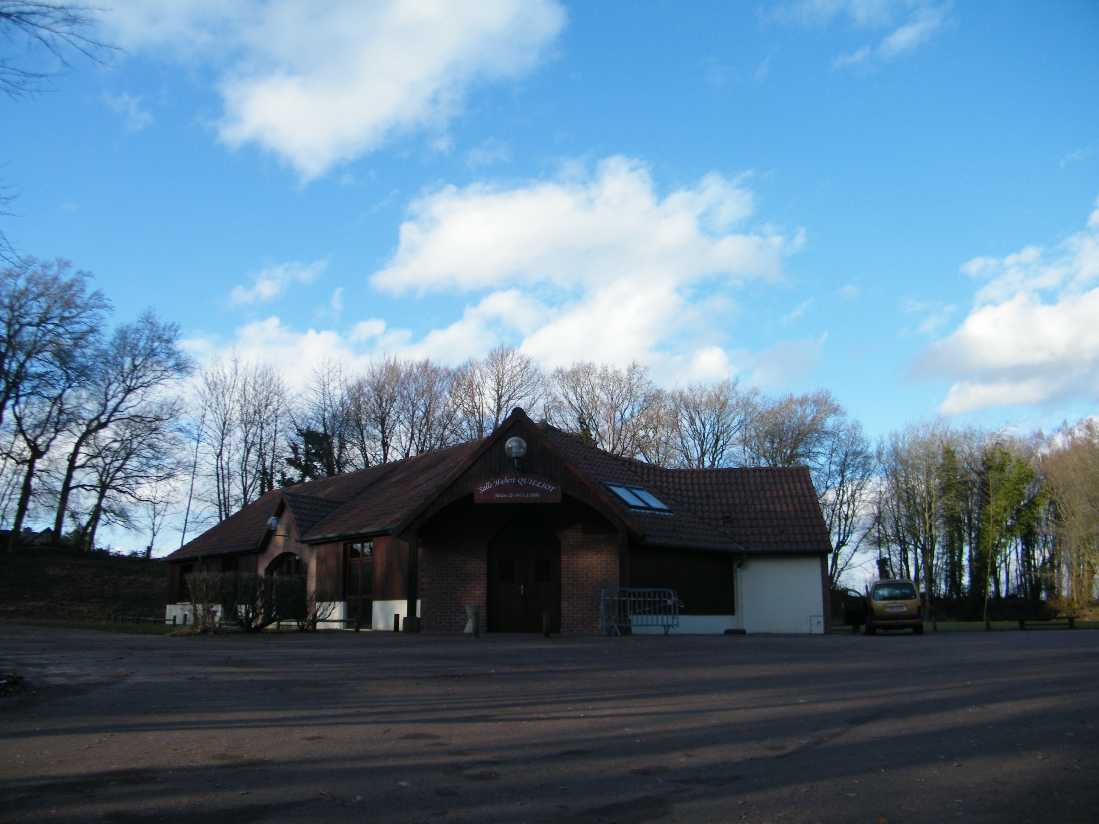 Salle Henri Quilllot